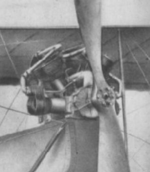 Kolbányi Géza motorja. A léghűtéses motor hat hengere legyezőszerűen volt elrendezve, teljesítménye elérte a 60 lóerőt (kb. 44 kW) és az egy lóerőre eső mintegy 1,7 kg tömeg viszonylatában a legjobbak közé tartozott a maga kategóriájában.